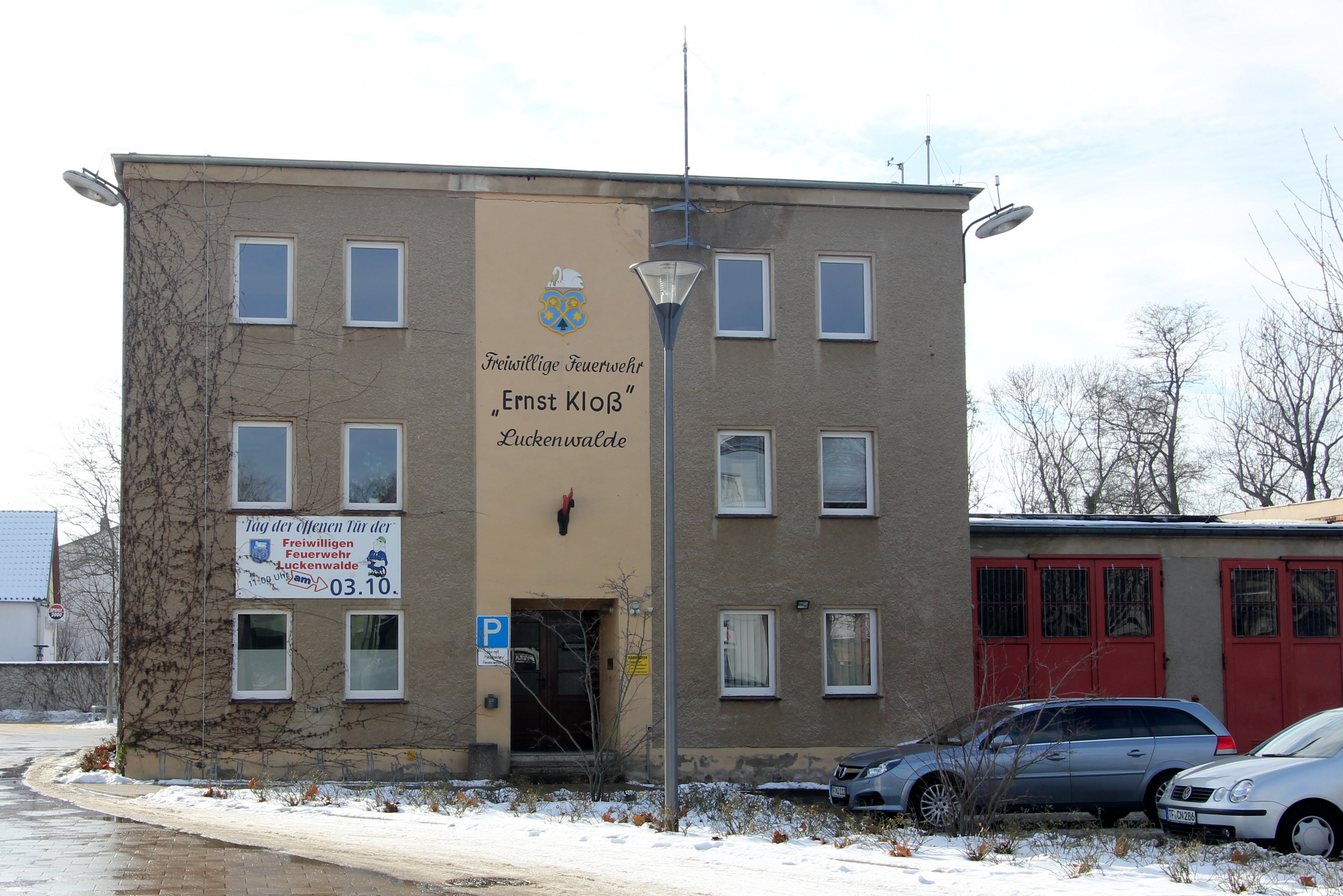 Luckenwalde in Brandenburg. Die Freiwillige Feuerwehr ist Ernst Kloß gewidmet.